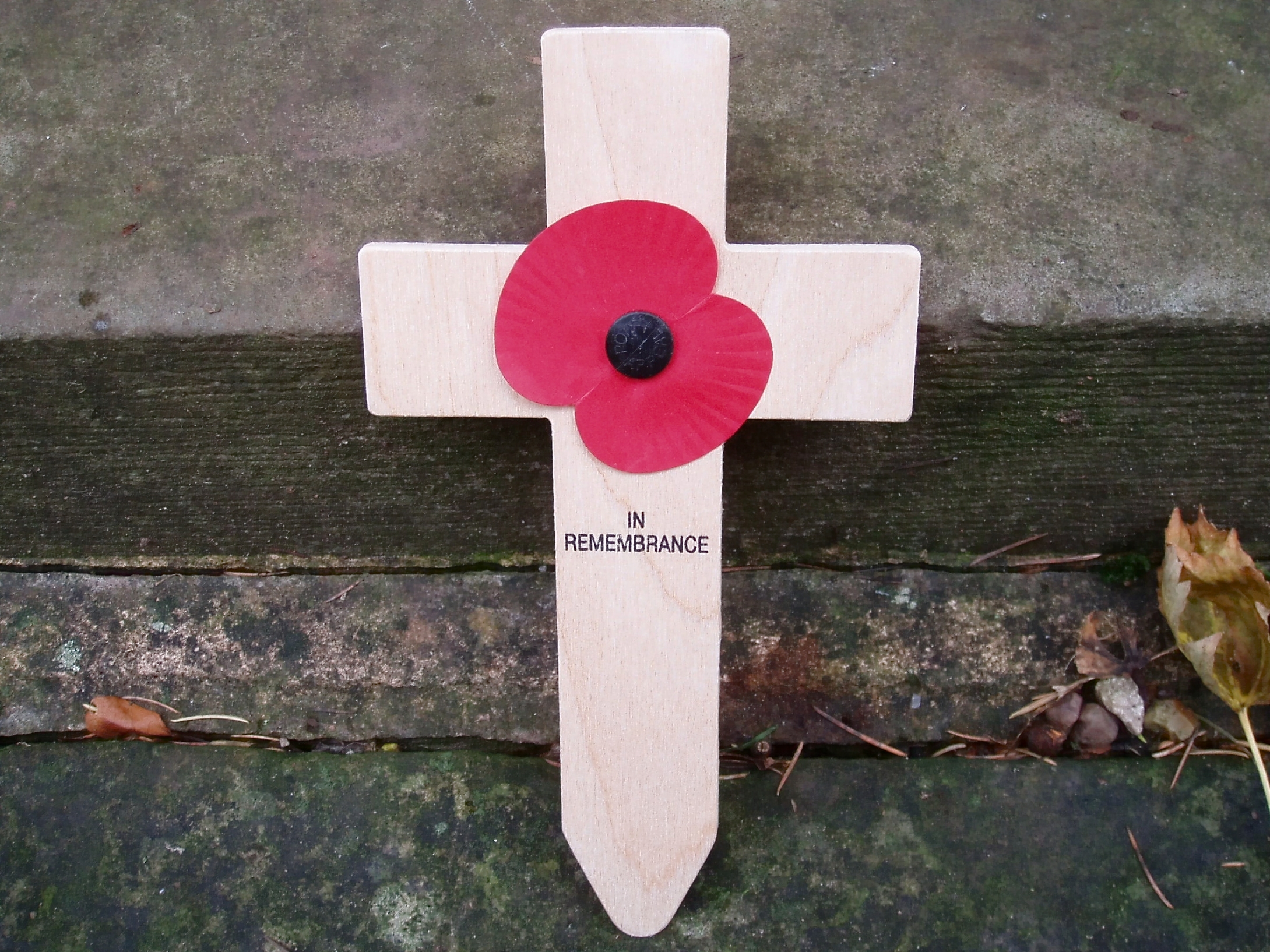 Kleines Gedenk-Holzkreuz mit einer remembrance poppy (deutsch 'Erinnerungs-Mohnblüte') und Inschrift "IN REMEMBRANCE" (dt. 'In Erinnerung'), das in englischsprachigen Ländern zum Gedenken an die gefallenen Soldaten der beiden Weltkriege Verwendung findet, insbesondere in den Wochen vor und am Remembrance Day.